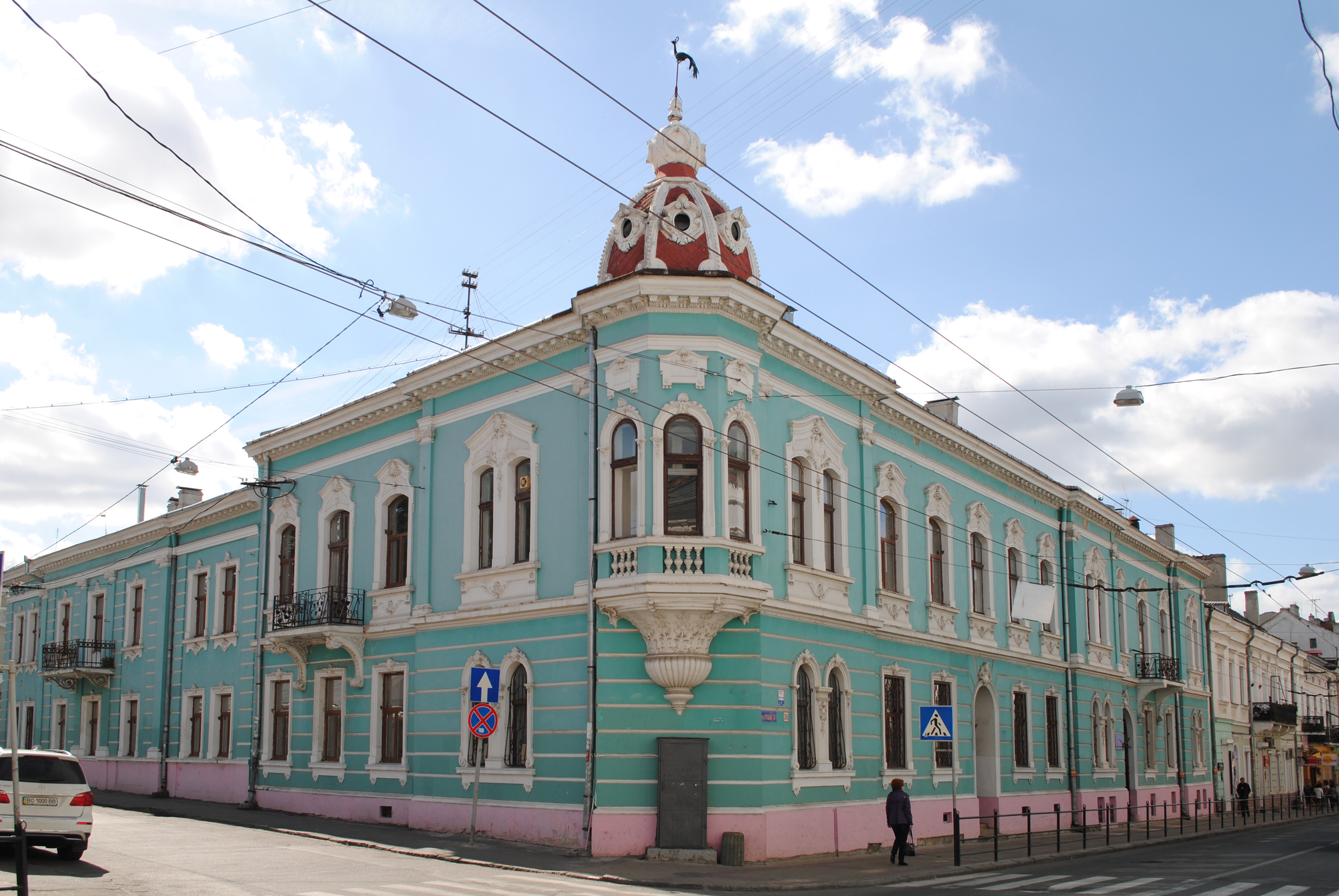 Житловий будинок (мурований) на вул. Руській, 36 у Тернополі.